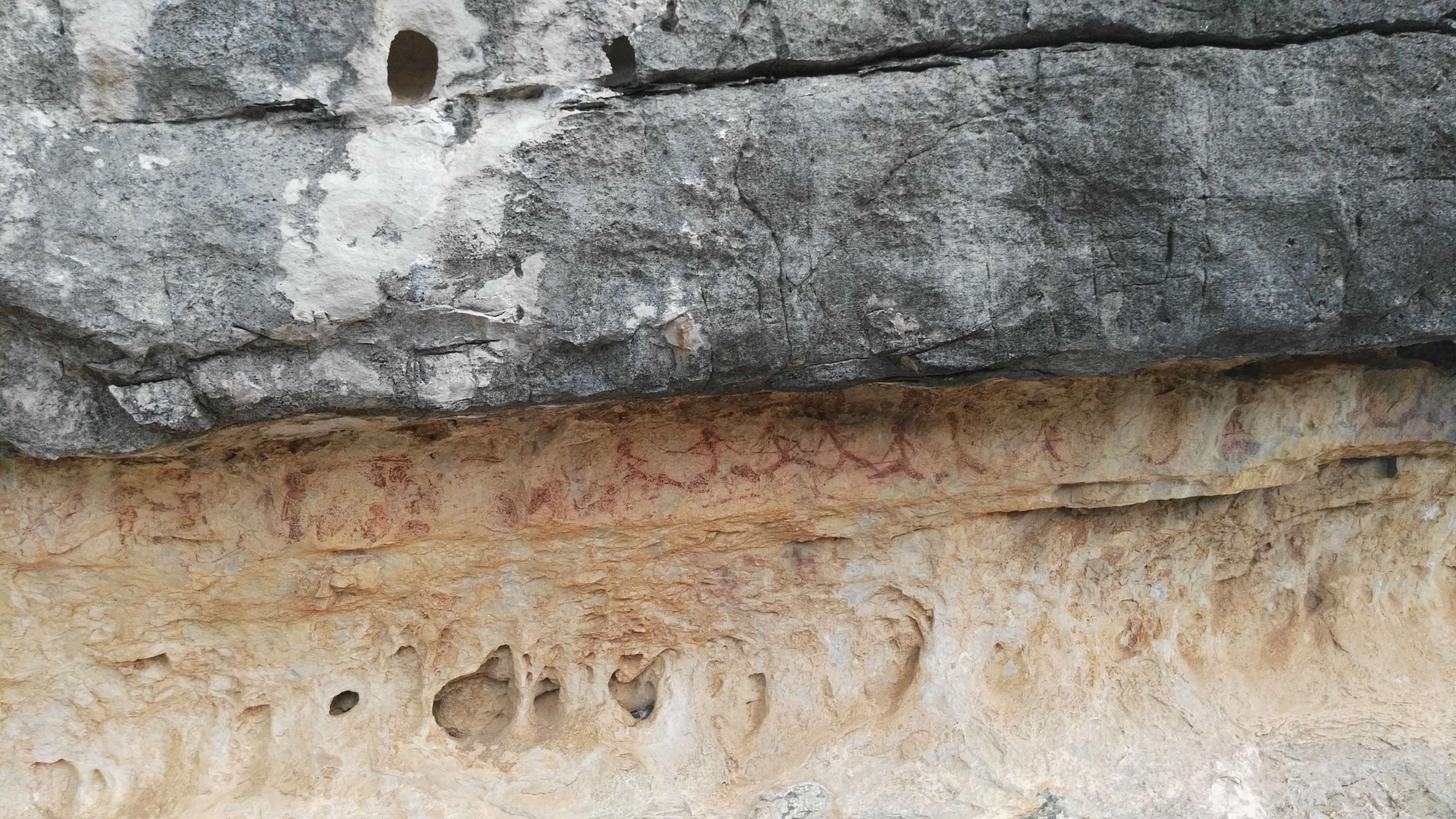 Pintures rupestres del Cocó de la Gralla al Parc Natural dels Ports, dins el terme municipal de Mas de Barberans.